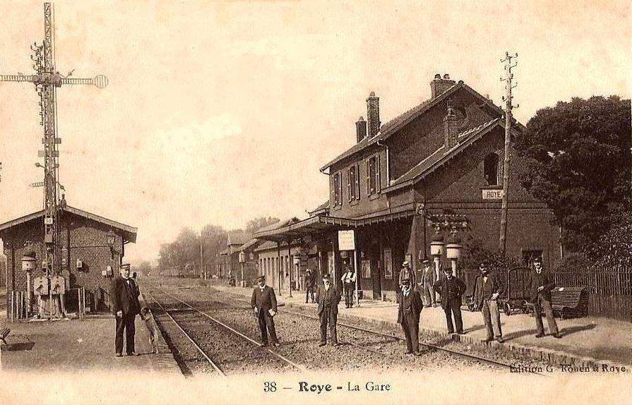 Le personnel de la gare posant pour le photographe. Ce premier bâtiment-voyageurs a été remplacé avant la Première Guerre mondiale.